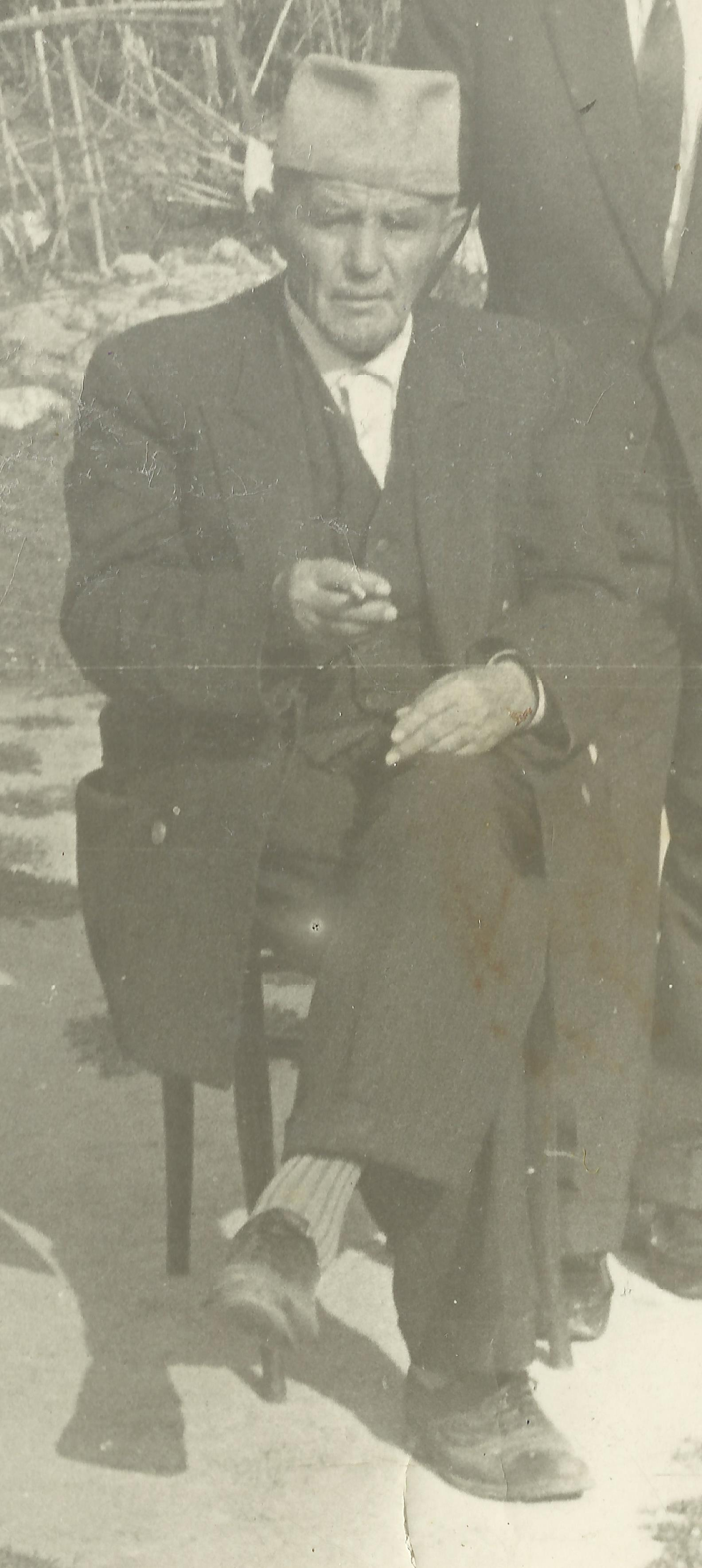 Bajram Bej Haxhiu-Lushnje